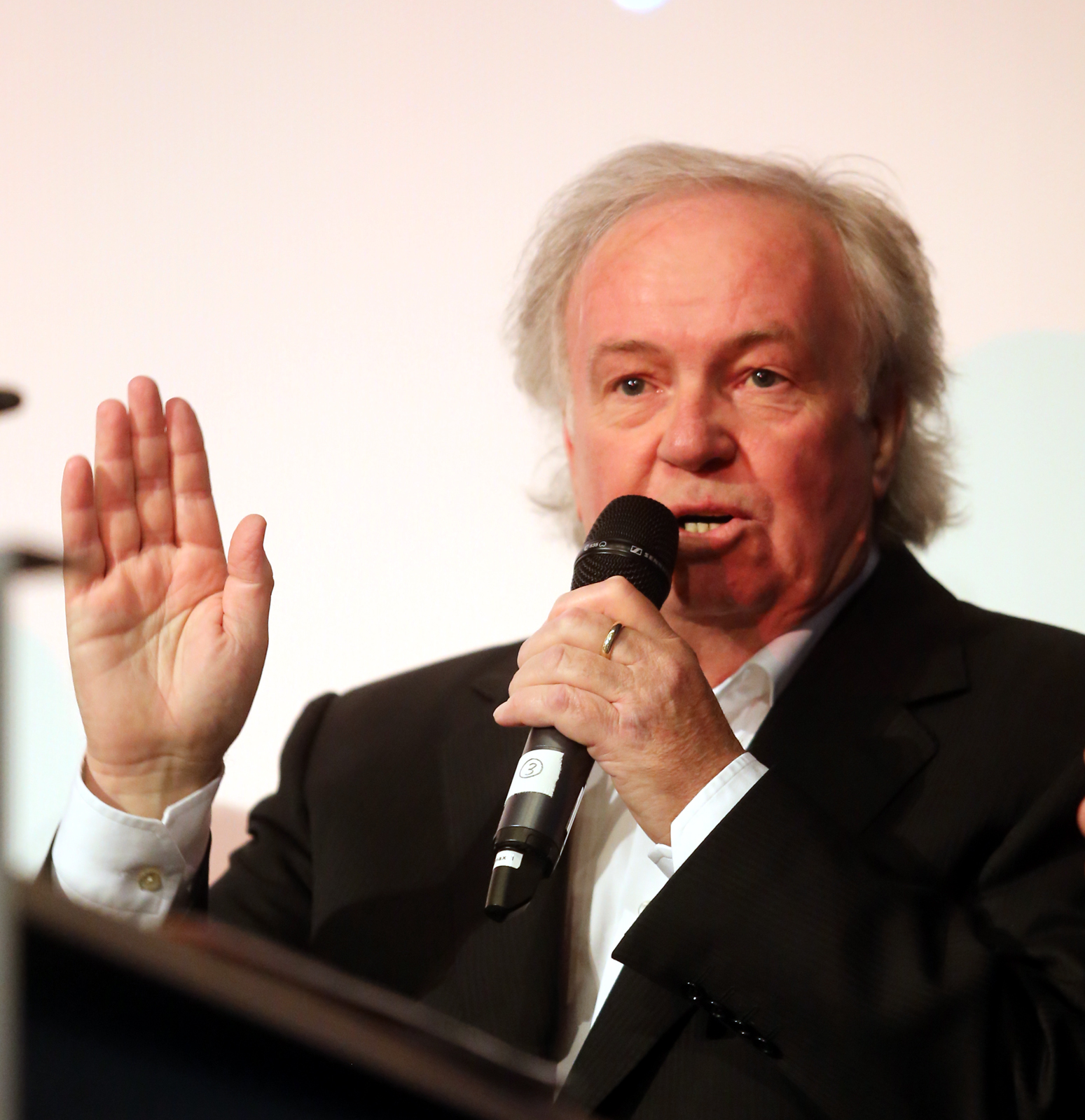 Franz Xaver Bogner, Regisseur. Hier während eines Fototermins in der Hochschule für Film und Fernsehen in München am 11.09.2014. Anlass: Preview der ersten zwei Folgen von "München 7" mit anschließendem Empfang.